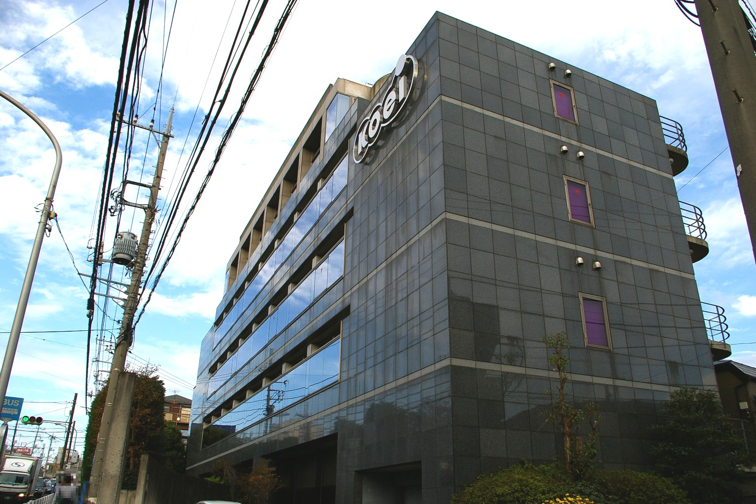 コーエー本社ビル (横浜市港北区)